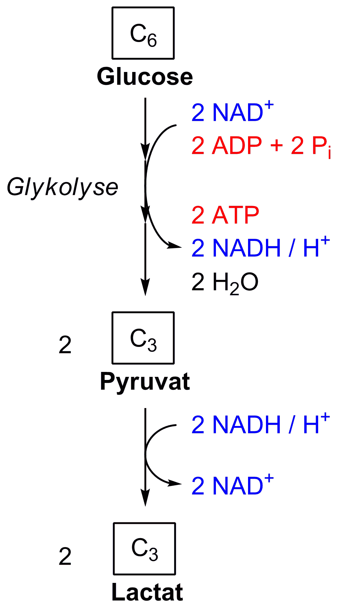 Homofermentative Milchsäuregärung, Übersicht